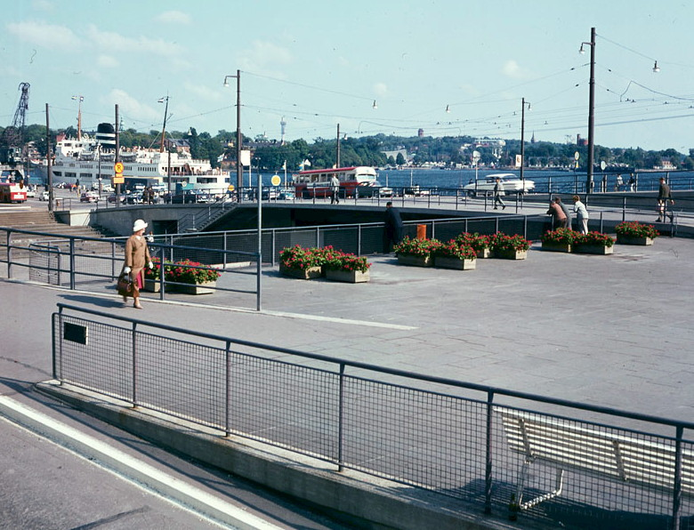 Slussterrassen. Vy åt nordost